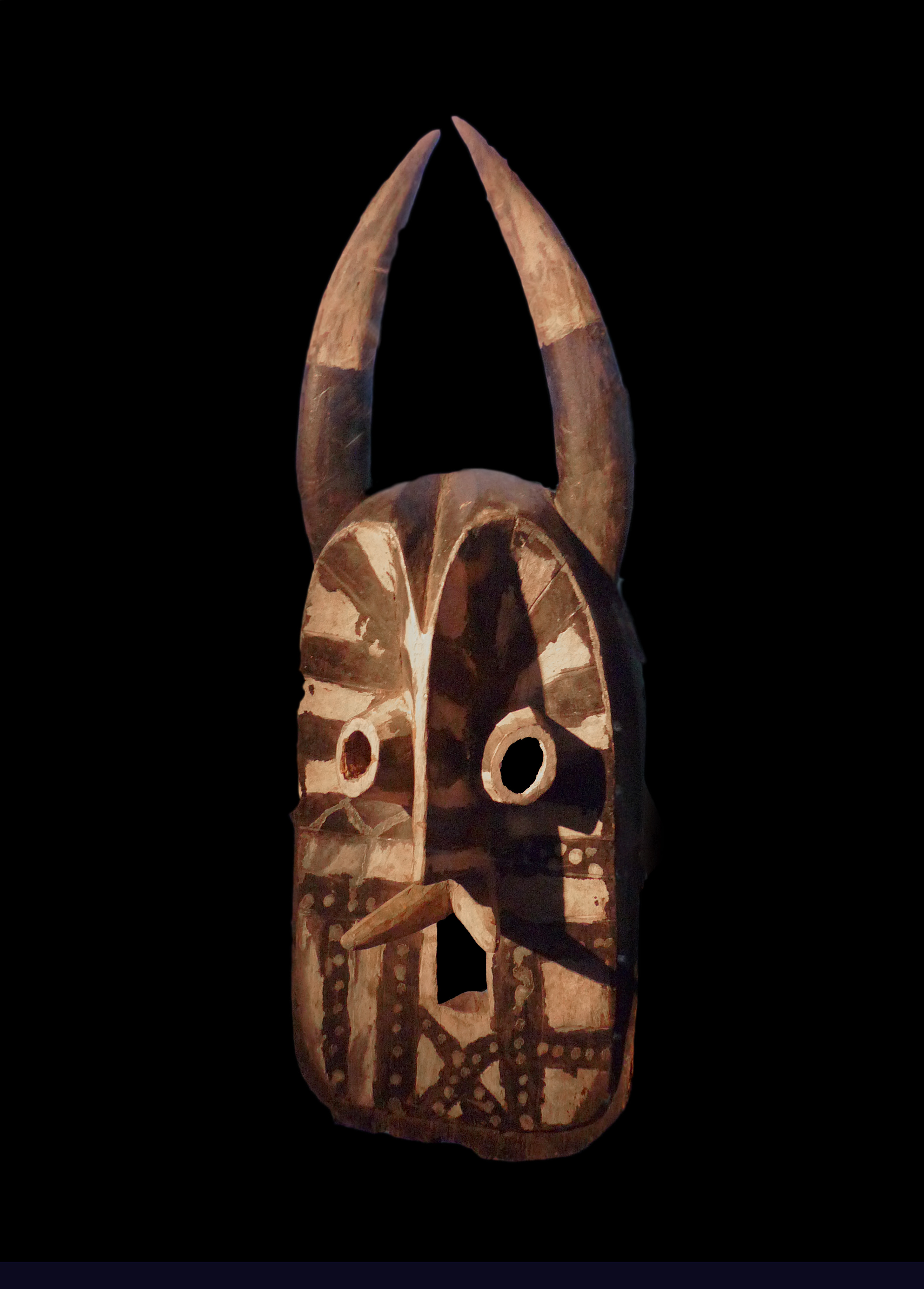 Masque Augum. Abakwariga, ville de Takum. Bois, pigment. Fowler Museum. Exposition Nigeria. Arts de la vallée de la Bénoué au musée du quai Branly (Paris).